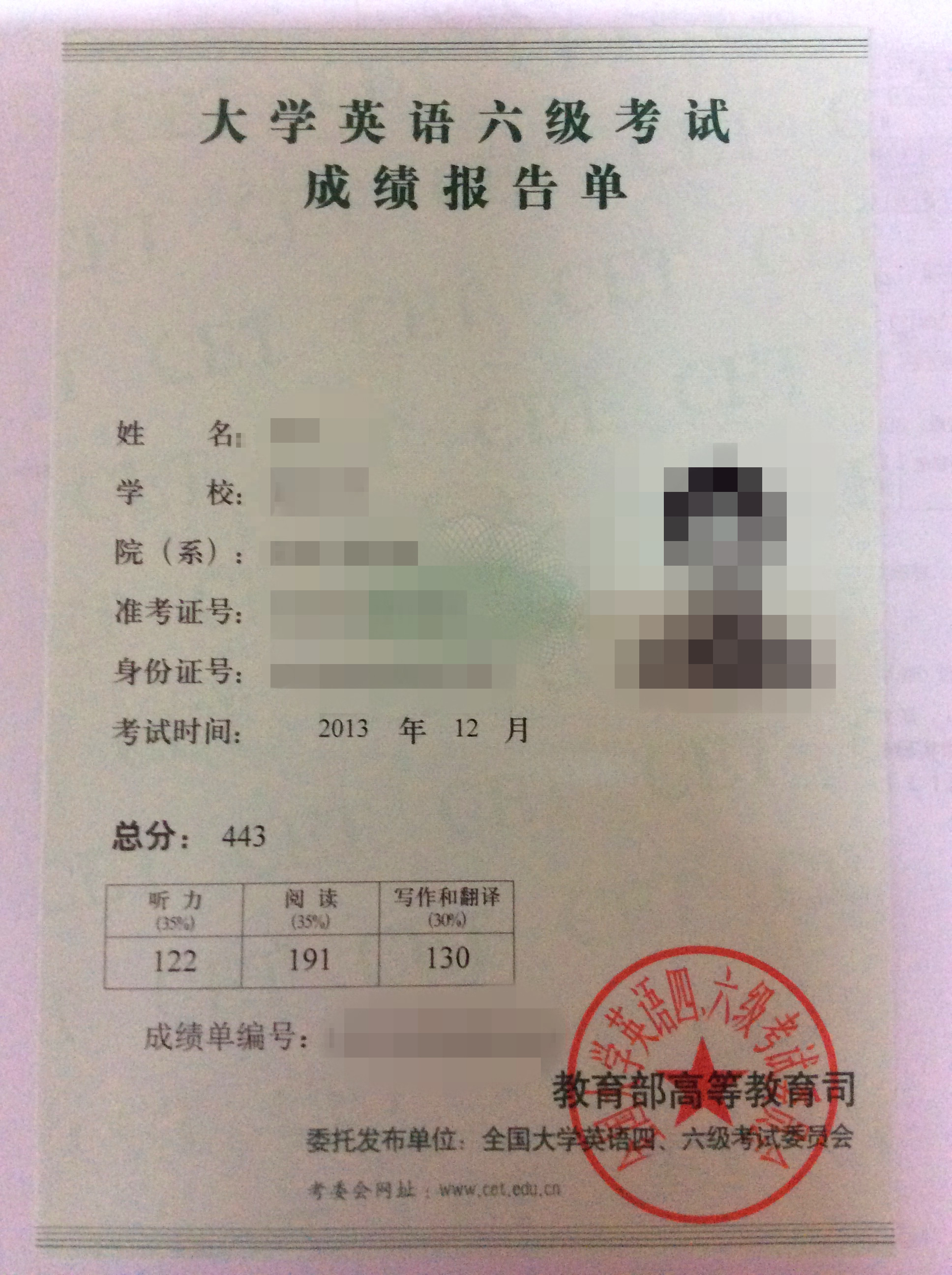 中文（中国大陆）: 大学英语六级考试成绩报告单